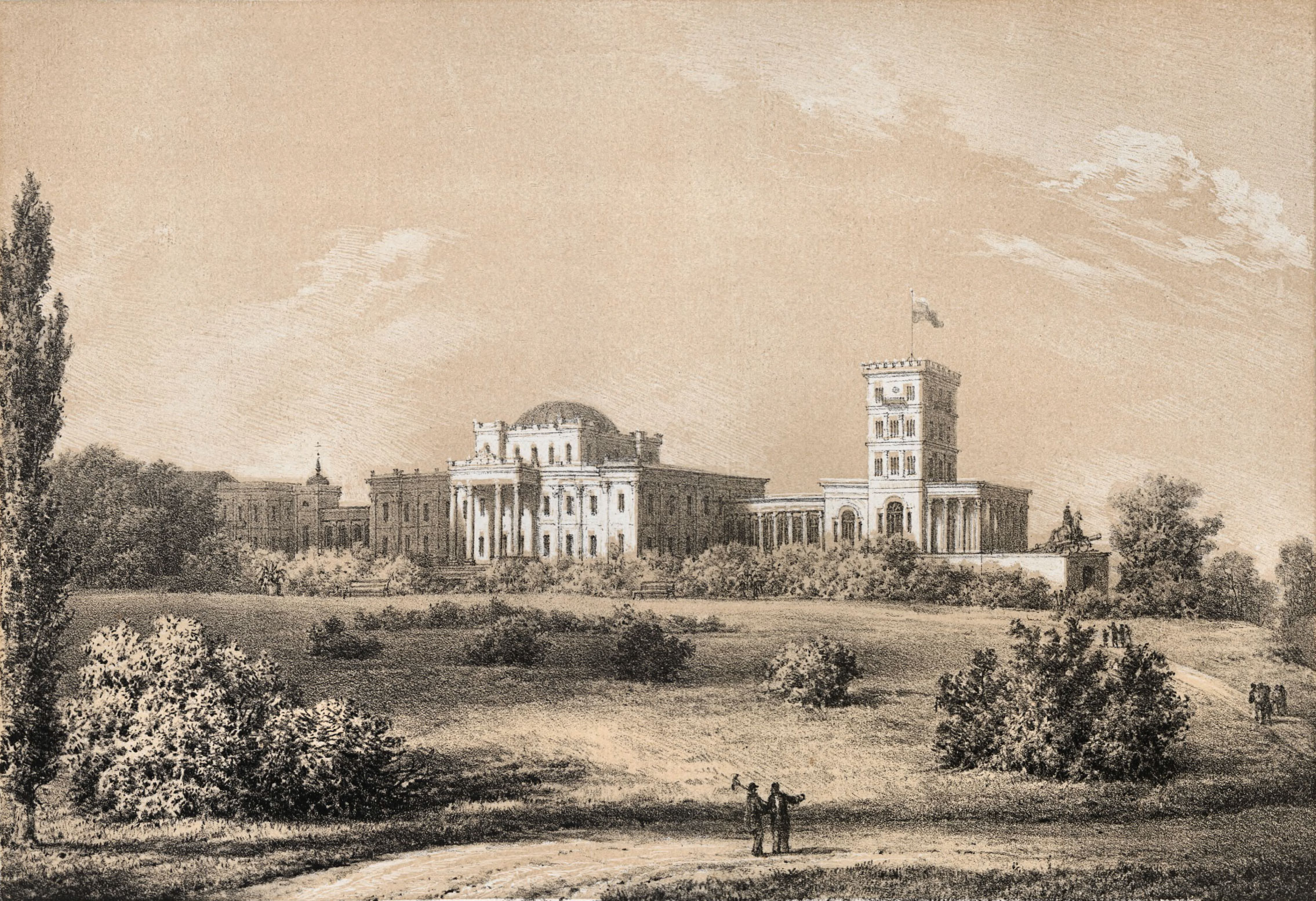 Беларуская (тарашкевіца): Гомель (Homiel), палац Румянцавых-Паскевічаў (Rumiancaŭ-Paskievič)